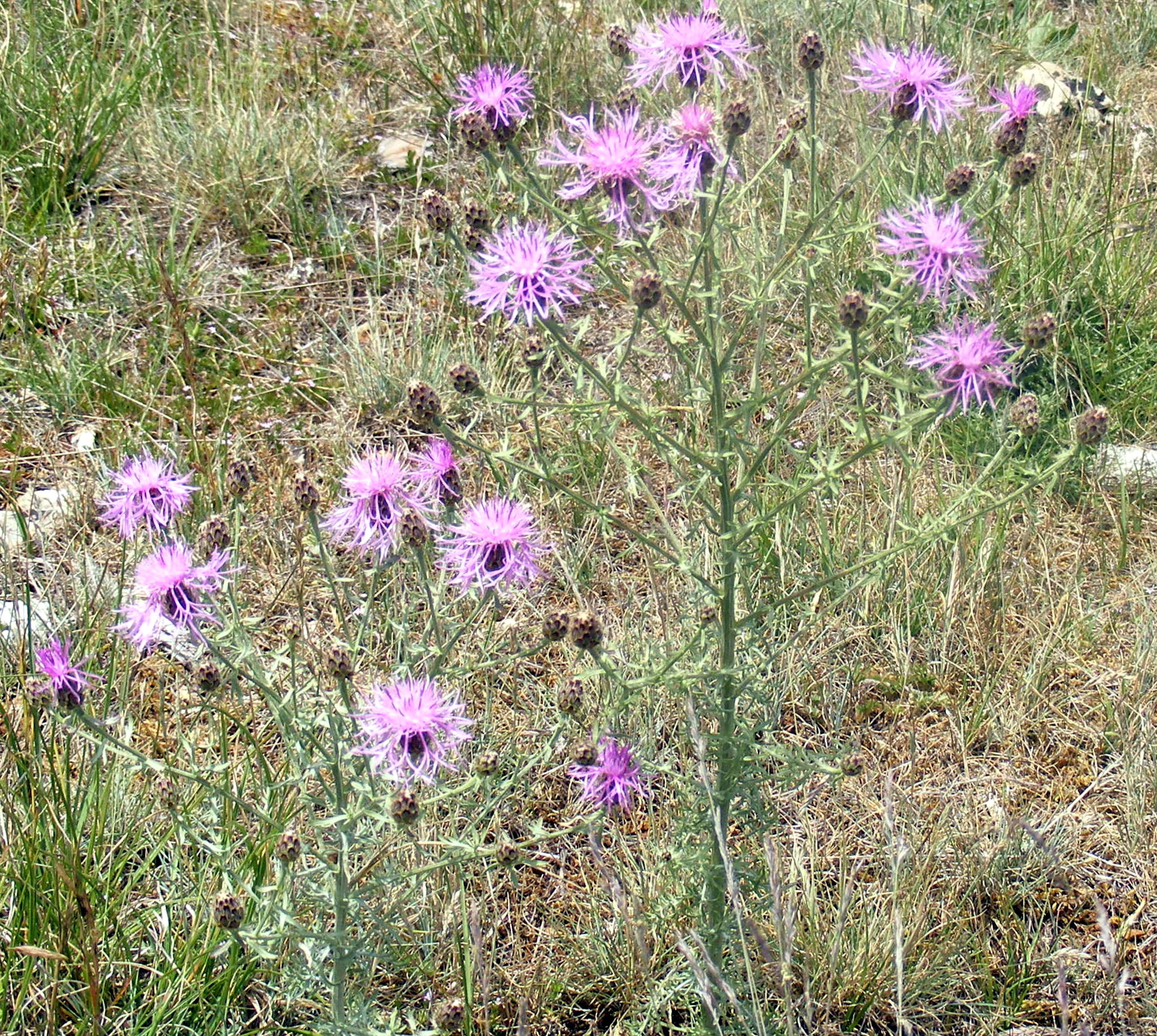 Centaurea paniculata (garmoncilla, escobillas) - Vista general. - Chanac (Departamento de la Lozère, Francia)